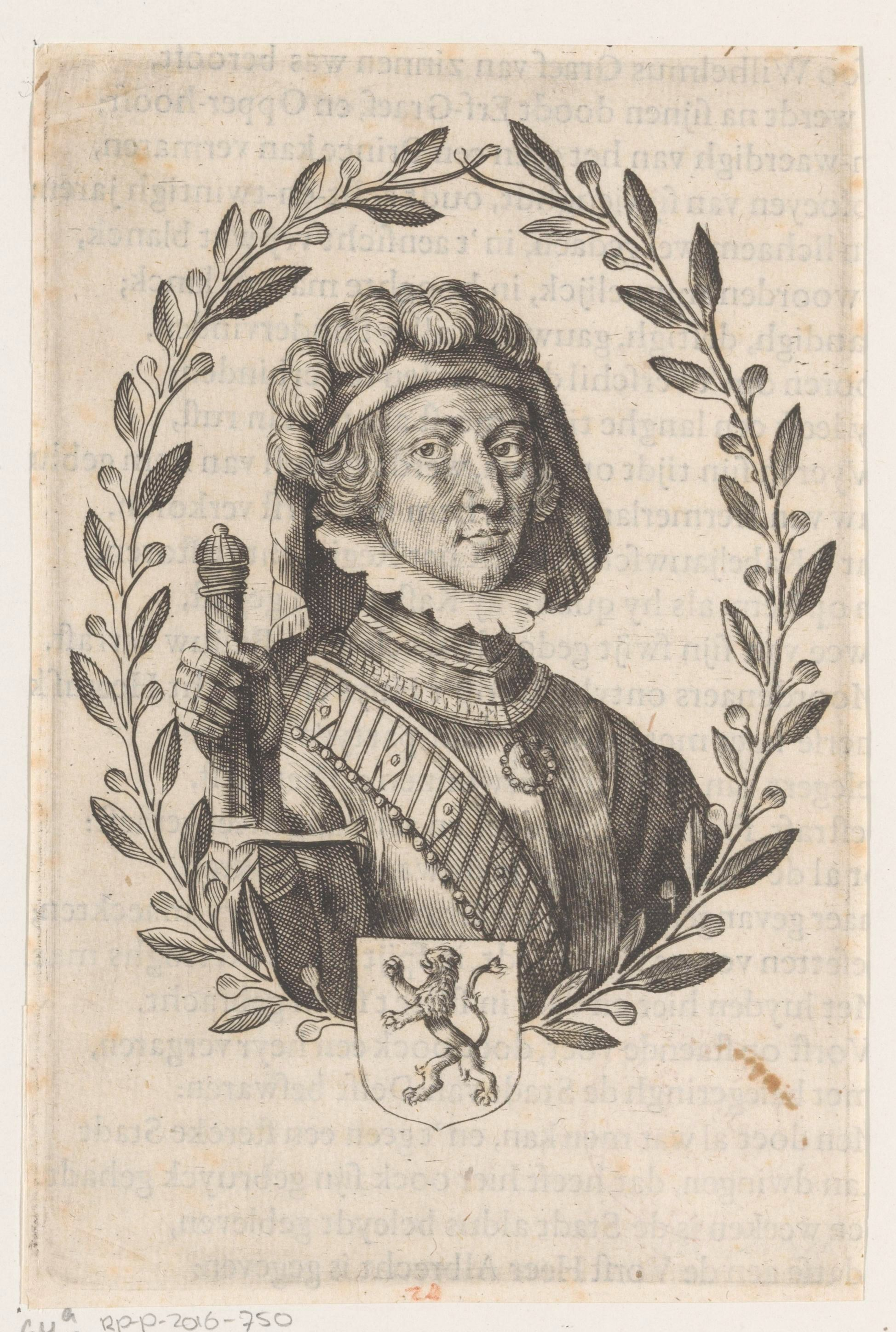 IdentificatieTitel(s): Portret van Albrecht van Beieren, graaf van Holland, Henegouwen en ZeelandObjecttype: prent boekillustratie Objectnummer: RP-P-2016-750Opschriften / Merken: verzamelaarsmerk, verso, gestempeld: Lugt 240Omschrijving: Midden onder zijn wapen.VervaardigingVervaardiger: prentmaker: anoniemDatering: 1600 - 1699Fysieke kenmerken: gravure en tekst in boekdruk op het versoMateriaal: papier Techniek: graveren (drukprocedé) / boekdrukAfmetingen: blad: h 155 mm (binnen plaatrand afgesneden) × b 102 mm (binnen plaatrand afgesneden)OnderwerpWie: Albrecht van Beieren (graaf van Holland, Henegouwen en Zeeland)Verwerving en rechtenVerwerving: overdracht van beheer 1816Copyright: Publiek domein